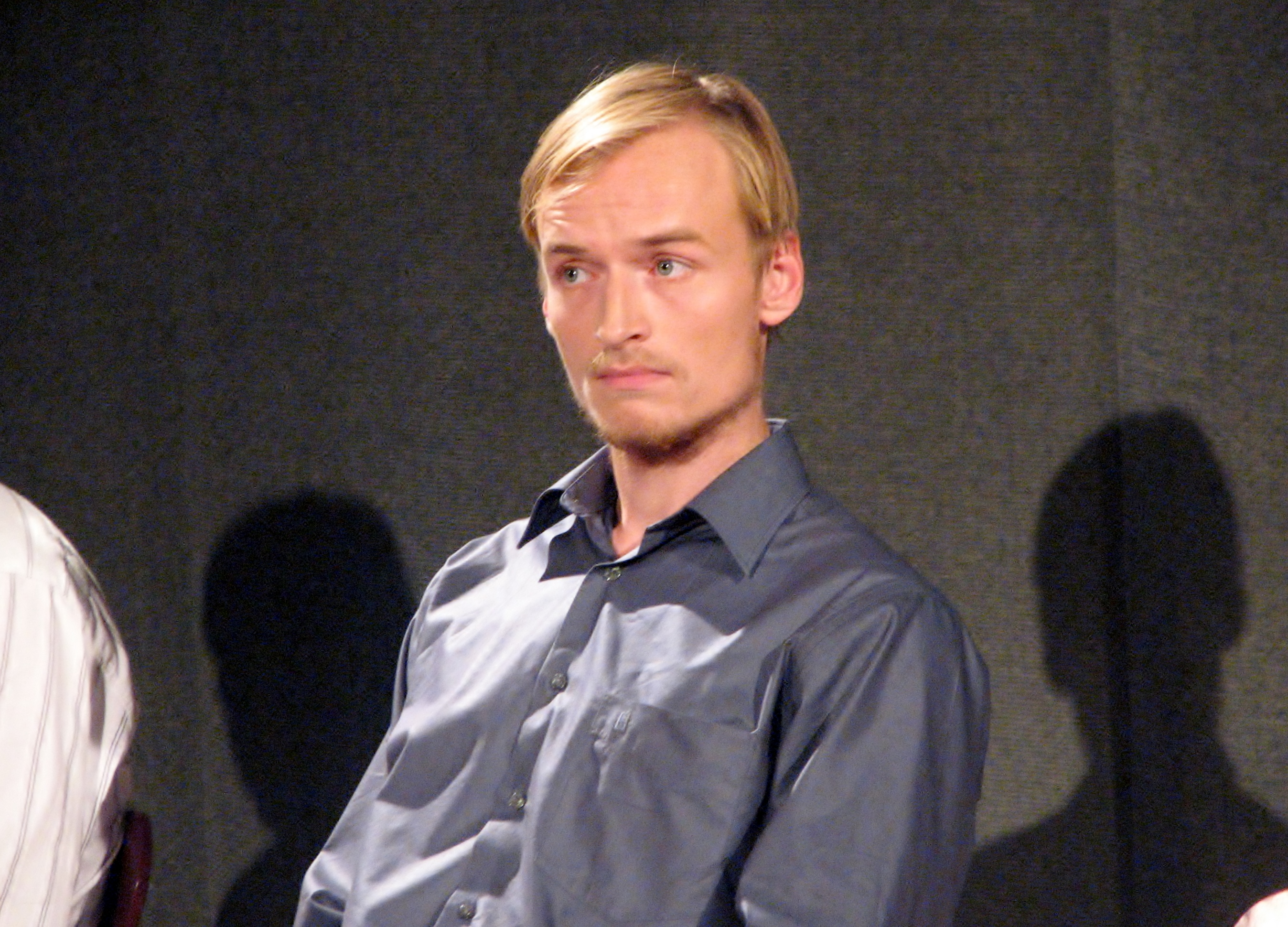 Kaspar Velberg Tallinna Kirjanike Maja laval festivali III Dovlatovi Päevad Tallinnas raames